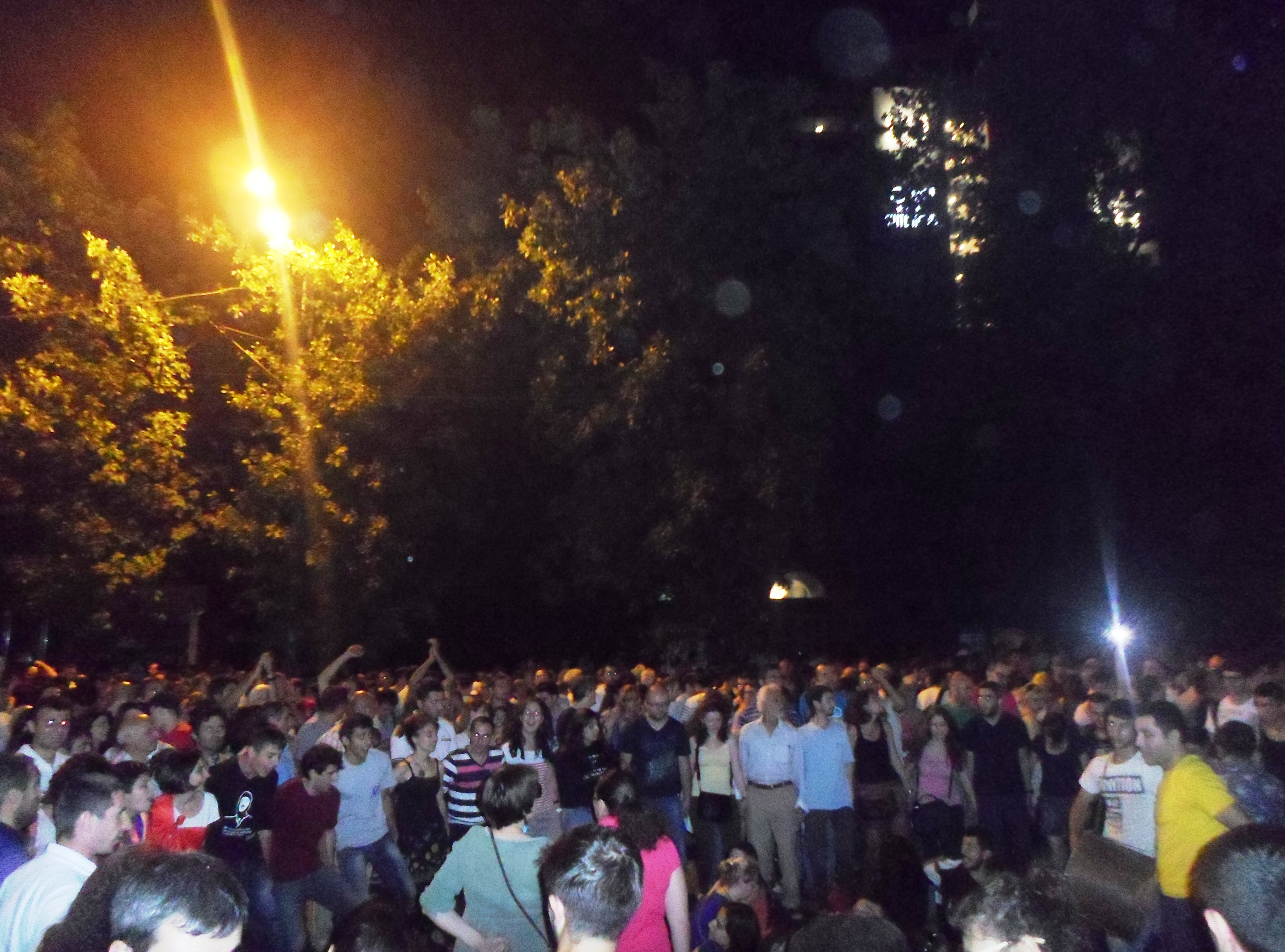 Բաղրամյան պողոտան՝ ընդդեմ հոսանքի թանկացման ցույցի մասնակիցների հանդեպ զանգվածային բռնություններից ժամեր առաջ, հունիսի 22